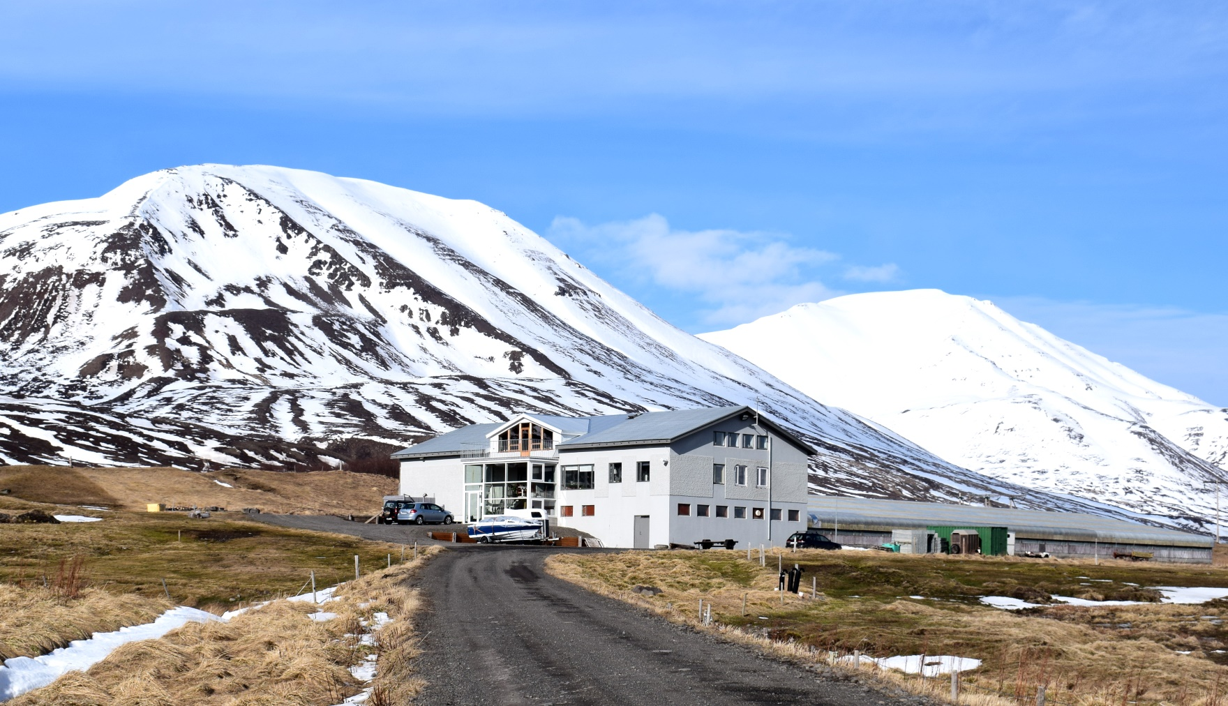 Böggvisstaðir í Svarfaðardal, Brimnesfjall og Karlsárfjall í bak.